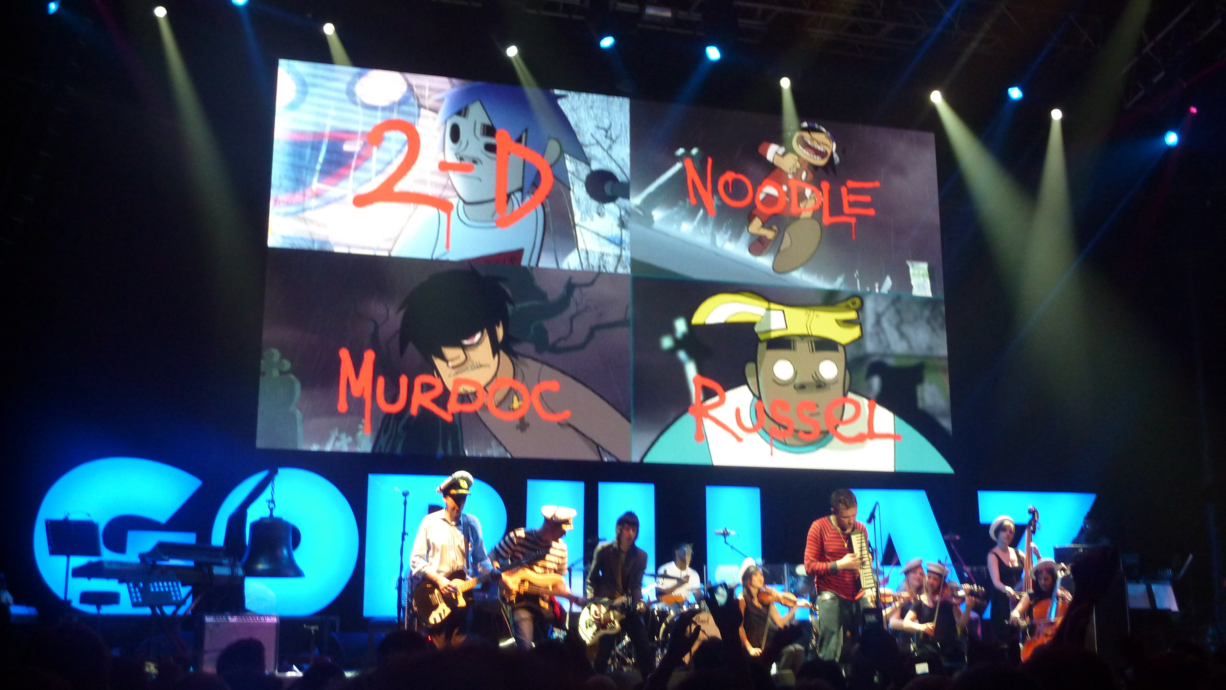 吴语: Imágen del grupo musical gorillaz